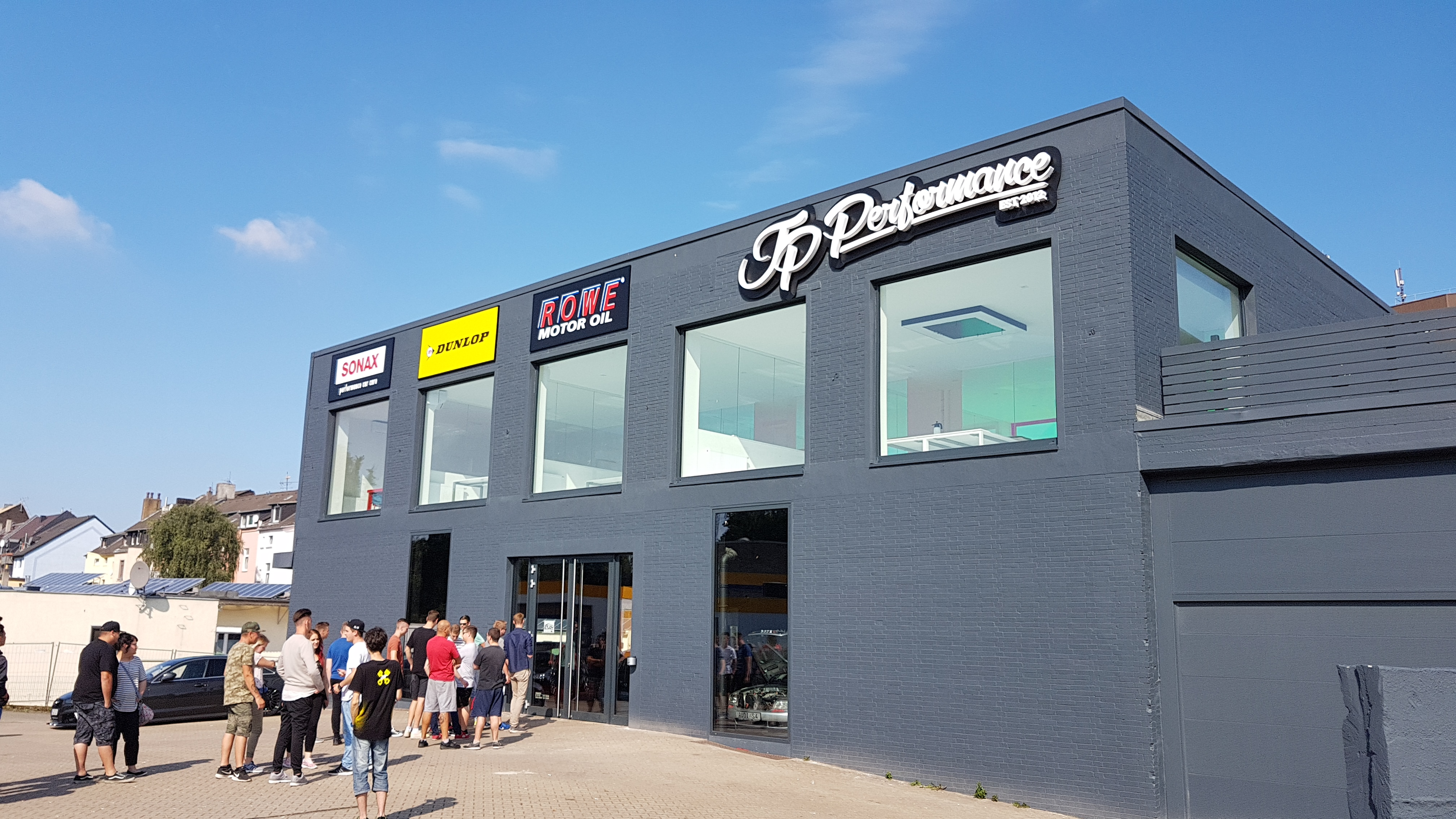 Das zweite Firmengebäude von der JP Performance GmbH von außen.